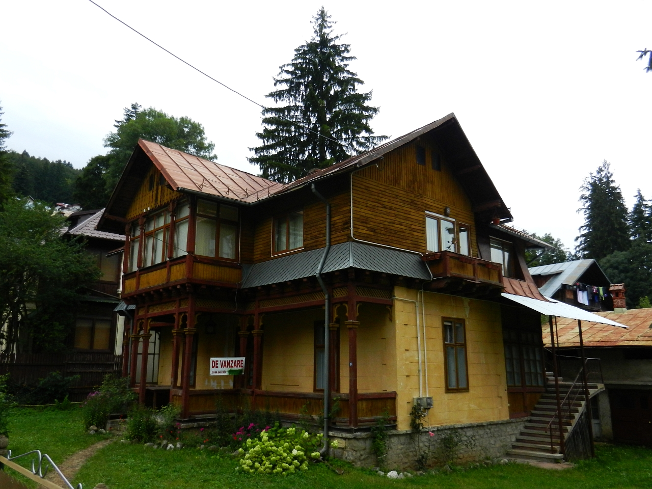 Casa Vasile Simion